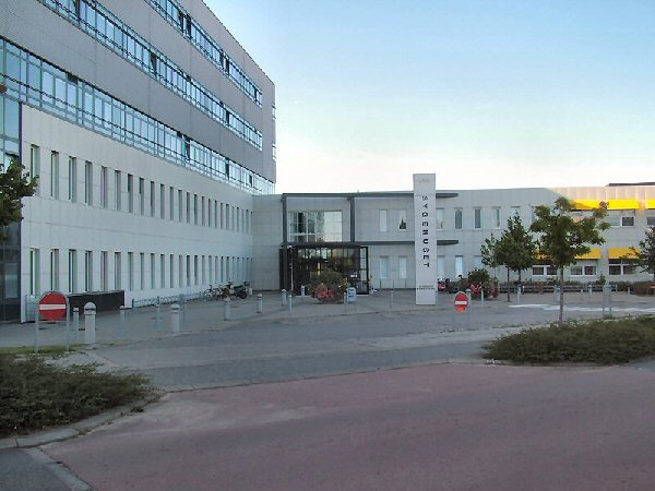 Sygehus Vendsyssel, indgangsparti.